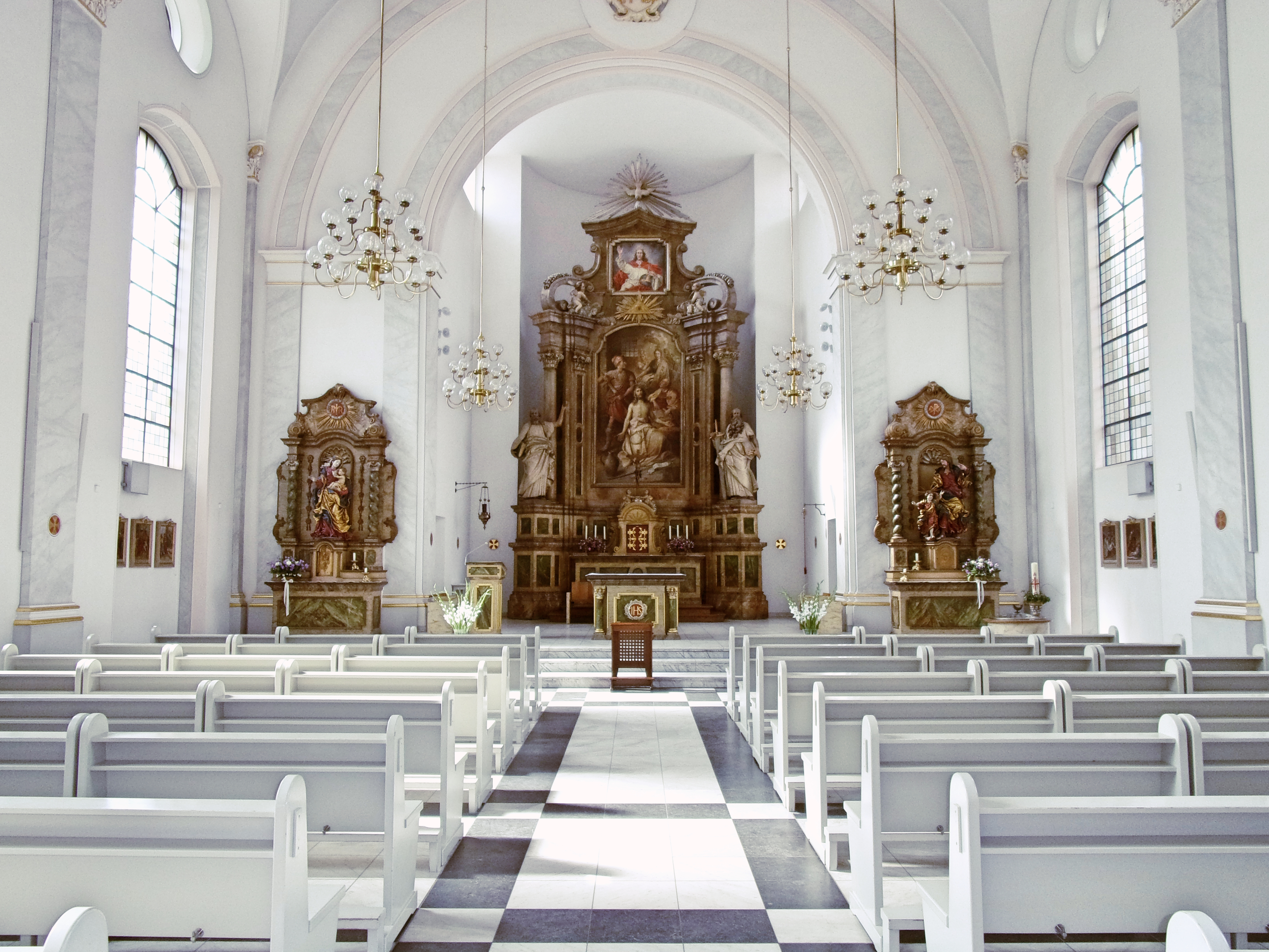 St.-Josephs-Kirche, Große Freiheit 43 in Hamburg-St. Pauli. Erbaut zwischen 1718-1721.This is a photograph of an architectural monument.